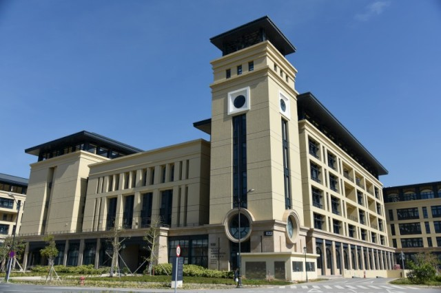 中文（香港）: 澳門大學工商管理學院